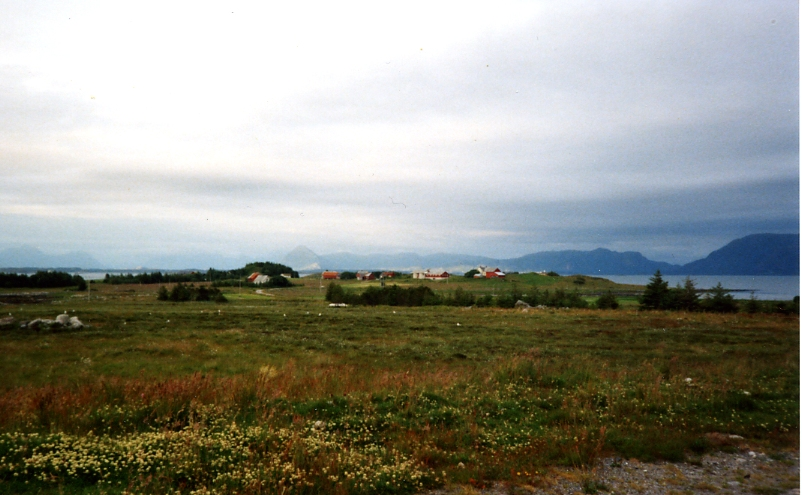 Bilde tatt av Ragnhild Thingstad utover et grønt Orten